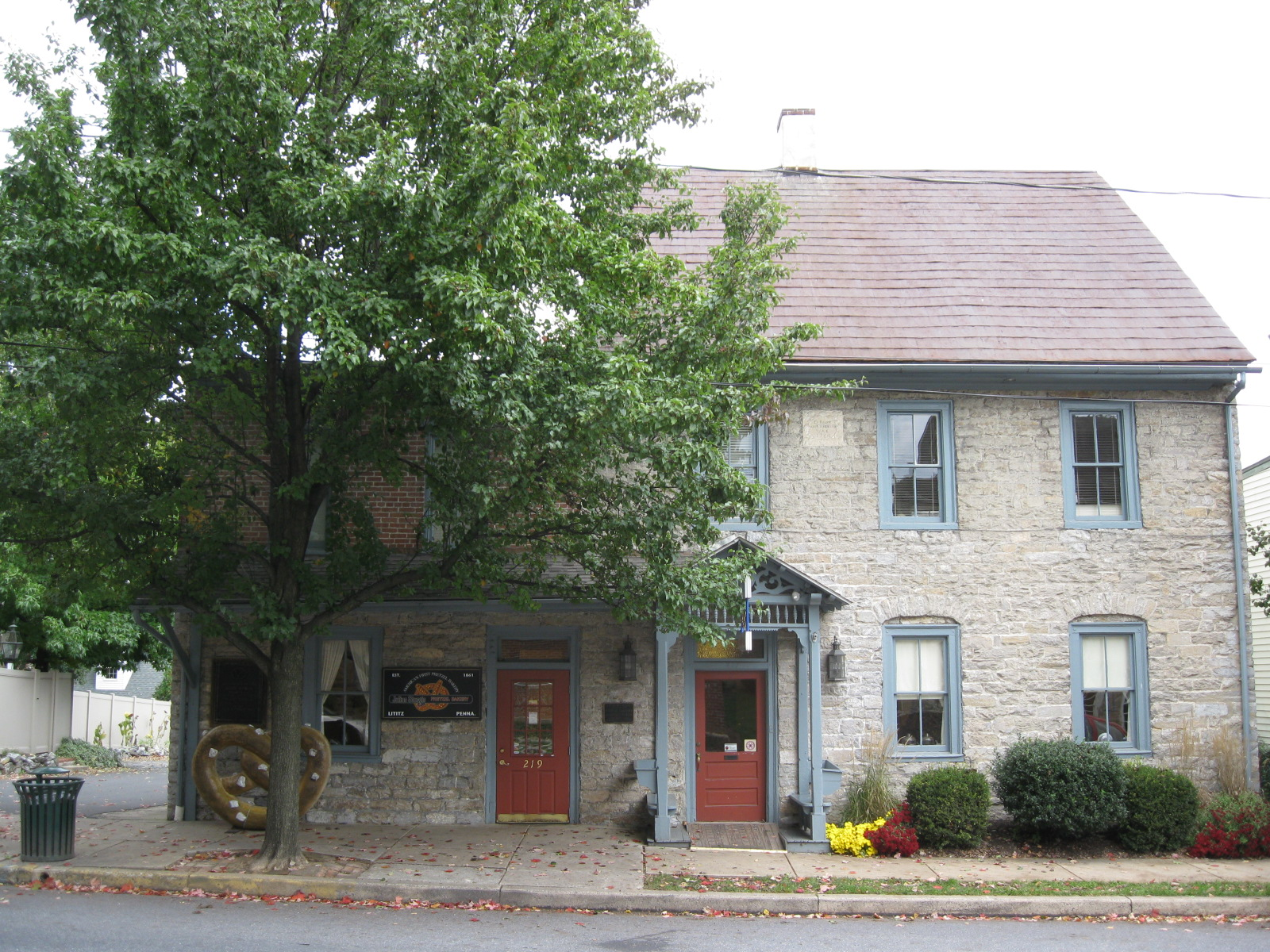 Lititz, Pennsylvania